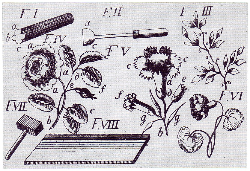 Werkzeuge und Erzeugnisse einer Blumenmanufaktur.